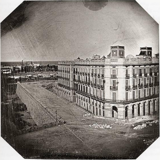 Vista al daguerrotipo, de Barcelona, en 1848. Uno de los primeros daguerrotipos conservados en España. "Vista de la casa Xifré" (sic), pero que en realidad es la vecina "Casa Vidal Quadras", de Barcelona. La imagen está invertida lateralmente (dato esencial, para comprobar que no es exactamente la Casa Xifré). Además, si fuese la casa Xifré tendría que tener planta totalmente rectangular, con esquinas en ángulo recto, sin chafán, y una rica decoración entre los arcos, con medallones y otros motivos ornamentales. Por todo ello no es la Casa Xifré. Sin duda, es la Casa Vidal Quadras, edificada también por un indiano (antiguo emigrante enriquecido en América). (Puede comprobarse muy bien "navegando" en Google maps, en Barcelona, por el Passeig d'Isabel II, recorriendo todos los porches y arcos, a nivel de calle, y desde lo alto). Colección particular. Tarragona